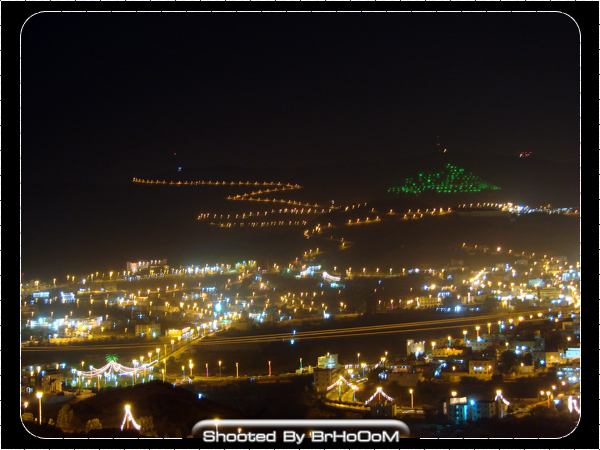 منظر ليلي لمدينة الباحة التقطت في صيف 2006 مع زيارة الملك عبدالله للمنطقة